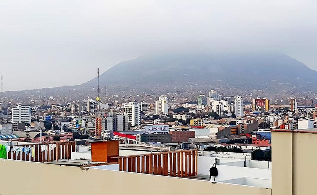 Panorámica de Trujillo al fondo urbanización Las Quintanas y San Fernando.